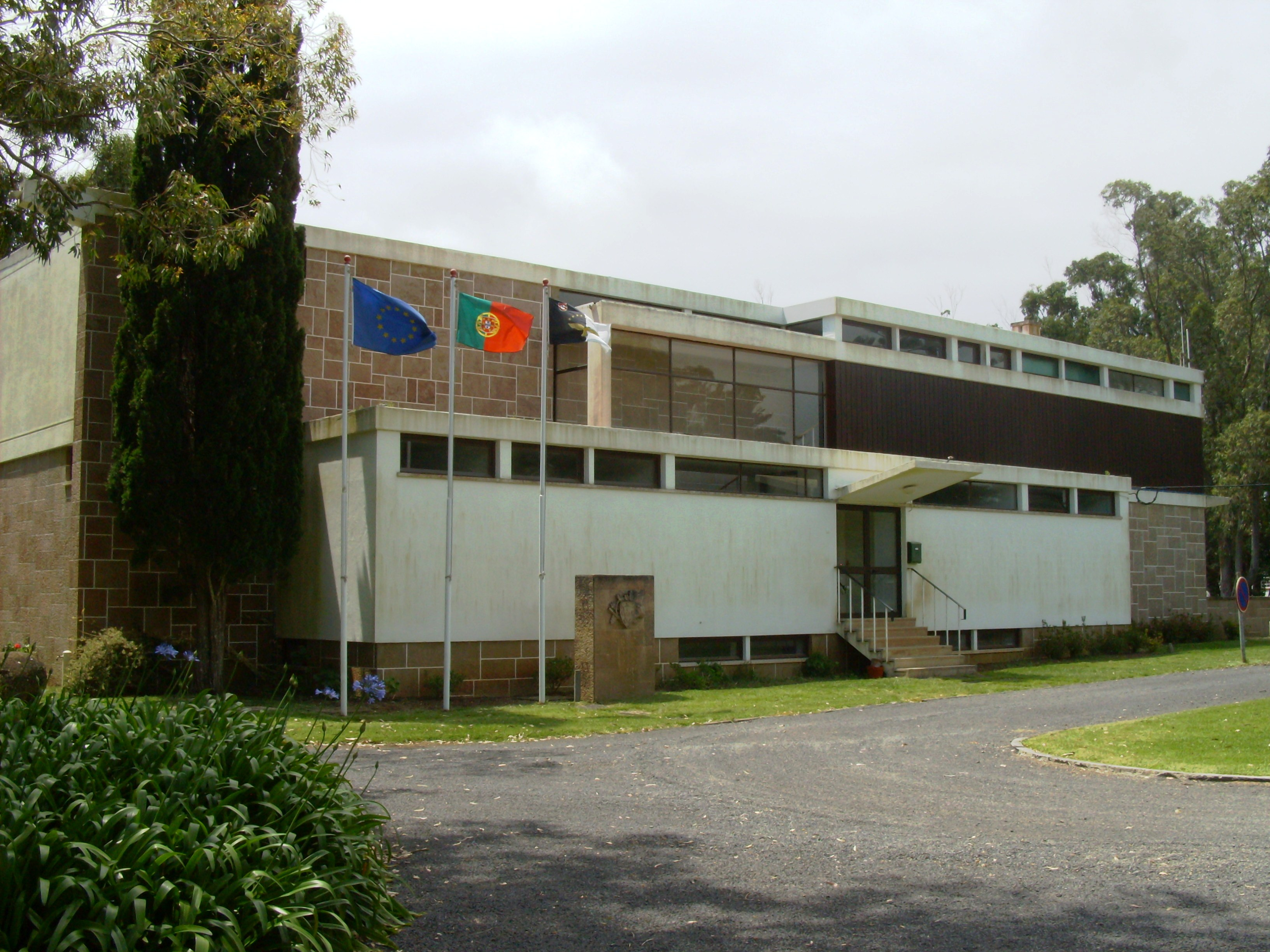 Reserva Florestal de Recreio de Valverde, Ilha de Santa Maria (Açores), Portugal.